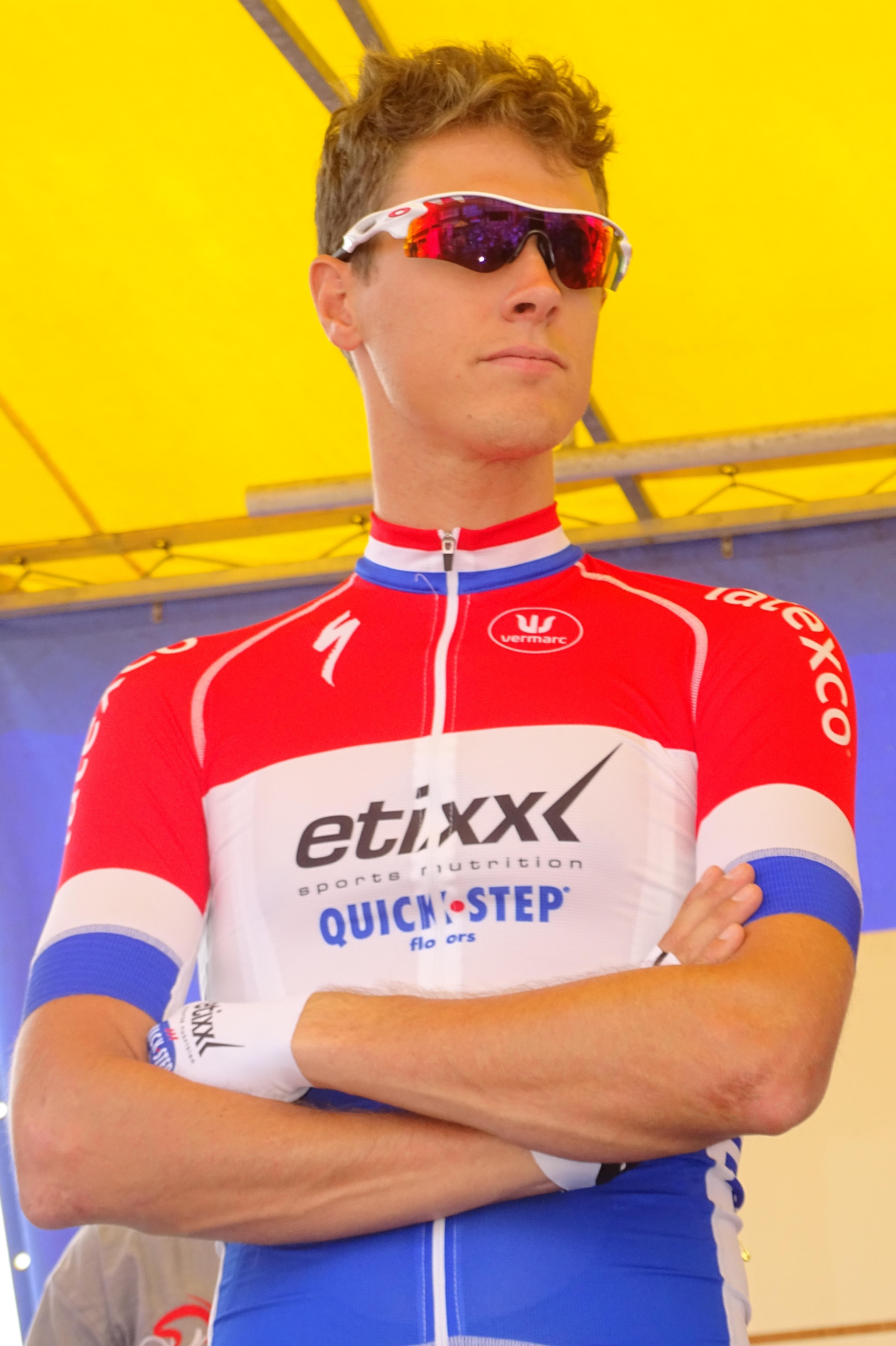 Reportage réalisé le mercredi 22 juillet à l'occasion du départ du Grand Prix Pino Cerami 2015 à Saint-Ghislain, Belgique.